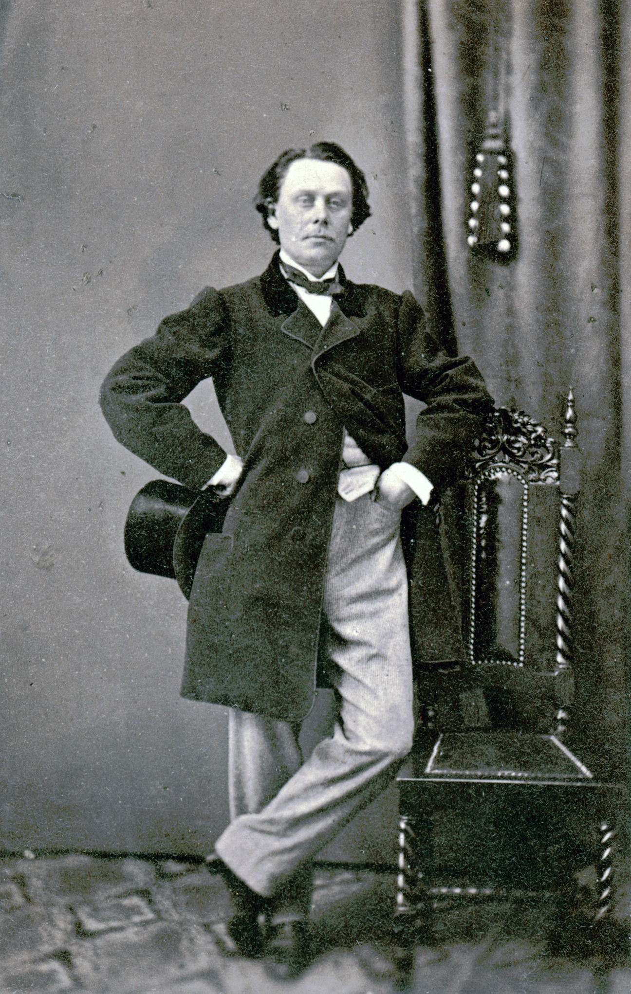 Gustaf Kinmansson, skådespelare vid Kungliga Dramatiska teatern 1863